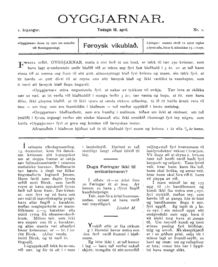 Færøernes første kvindetidskrift Oyggjarnar ved Súsanna Helena Patursson (første udgave 18. april 1905).